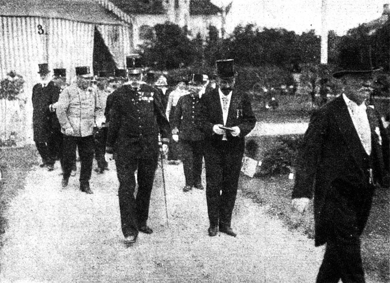 Weikersdorf (seit 1921 Teil von Baden bei Wien), Hohenzollernplatz (heute: Weikersdorfer Park/Platz), Erzherzog Rainer (1827–1913) bei der Eröffnung der Ausstellung „Ausstellung für Gewerbe, Handel, Industrie, Volksernährung und Weinbau des Viertels unterm Wienerwald“; im Hintergrund: Amtshaus Weikersdorf (heute: Rollettmuseum)